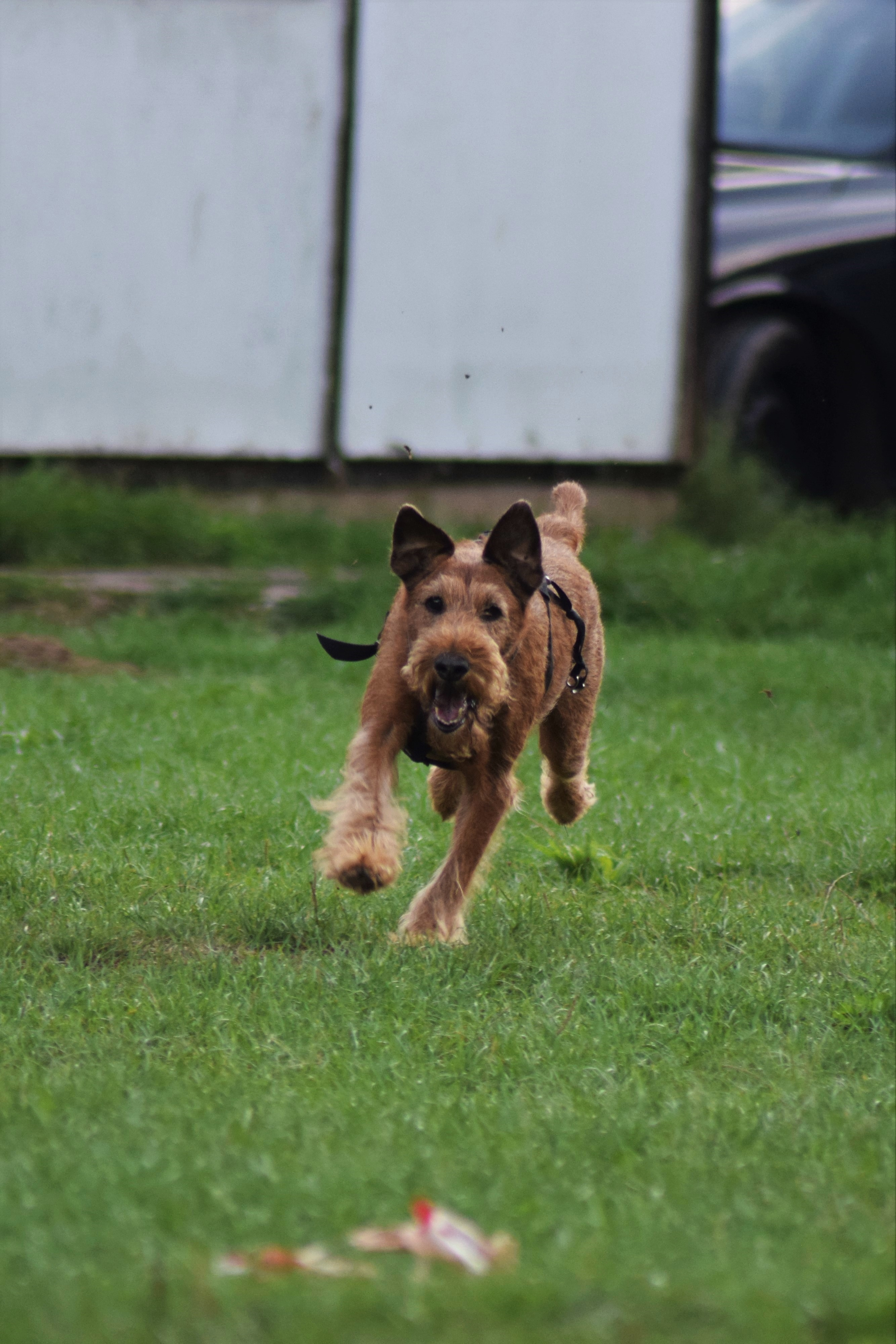 Irský teriér běžící za střapcem během coursingu na každoročním setkání majitelů a chovatelů Víkend s irským teriérem